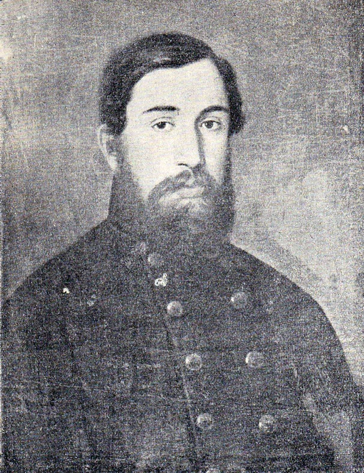 Necunoscut in uniforma